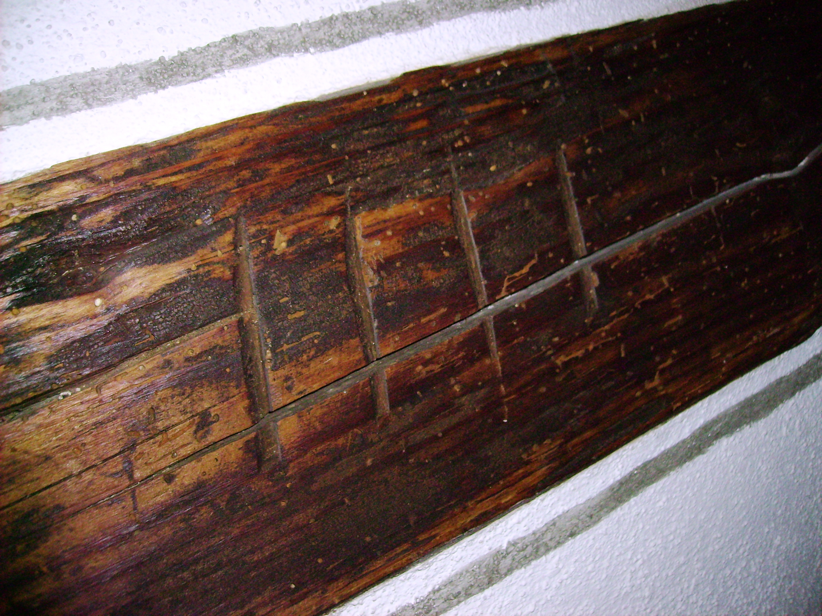 Abbund Feuchtwangen gleicher Ort